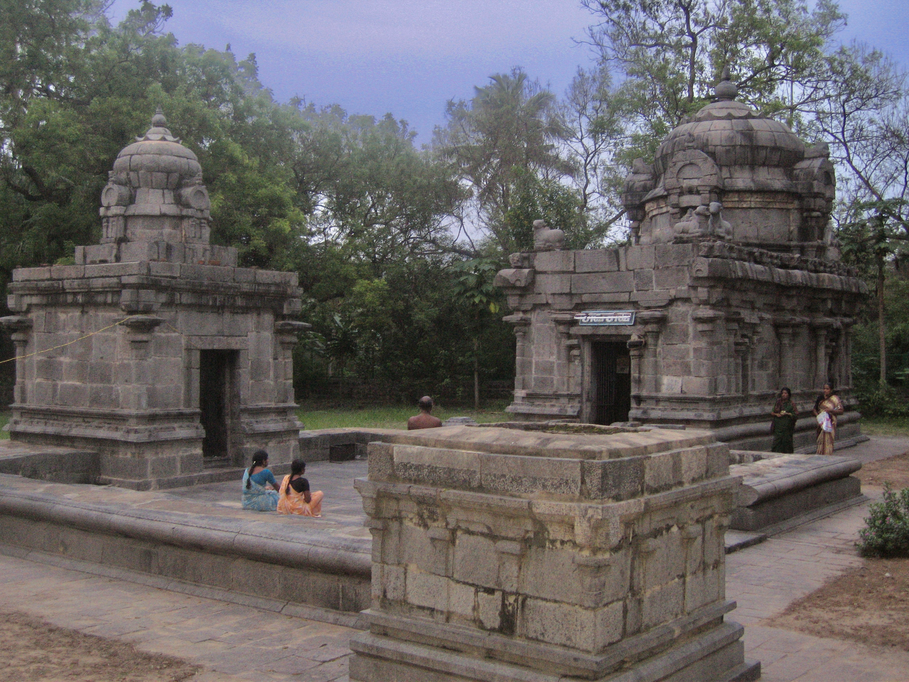 புதுவை மதகடிப்பட்டு அருகில் அமைந்திருக்கும் குண்டாங்குழி மகாதேவர் ஆலயம்